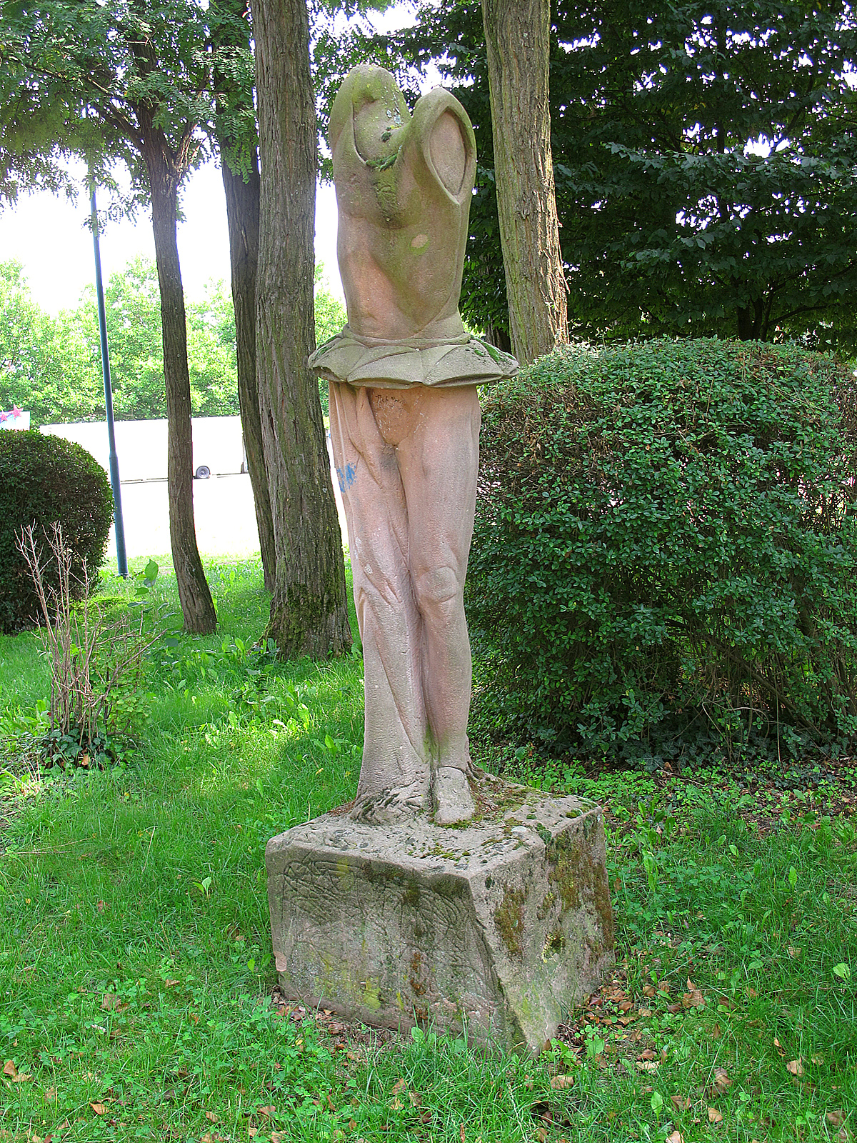 Daniel Moriz Lehr, Harlekin, 1989, - Deutschland, Rheinland-Pfalz, Skulpturenweg Jockgrim